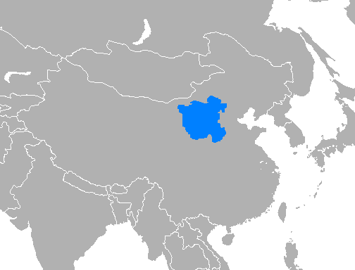 Idioma jin